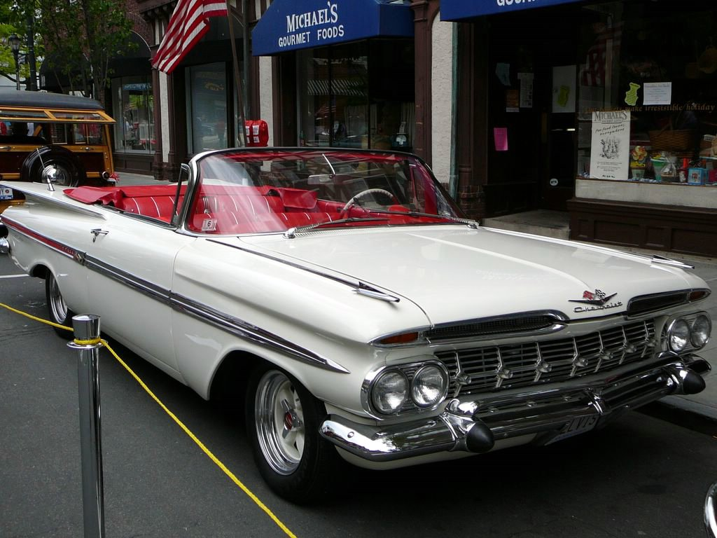 1959 Chevrolet Impala Convertible